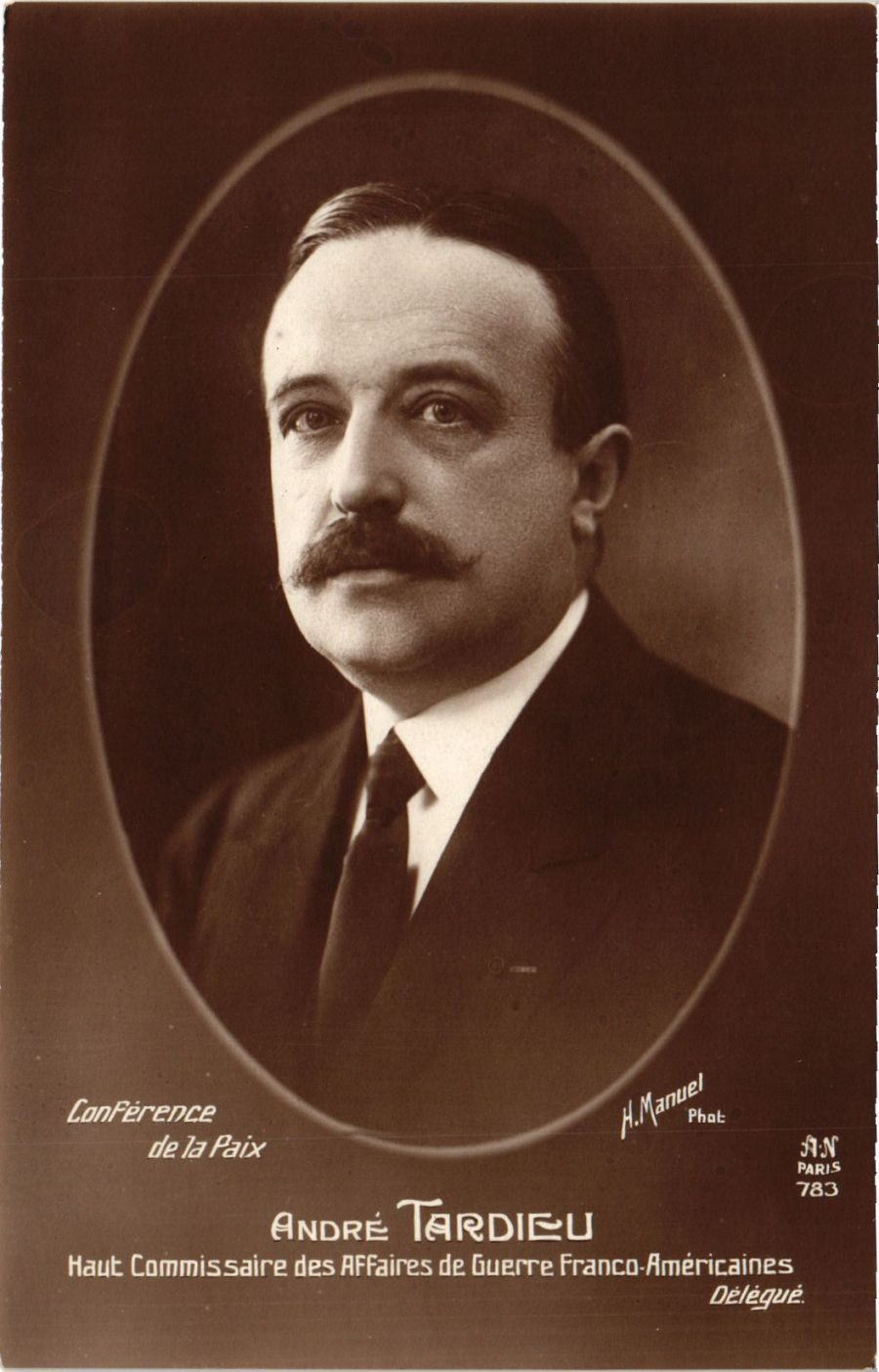 André Tardieu photographié par Henri Manuel.